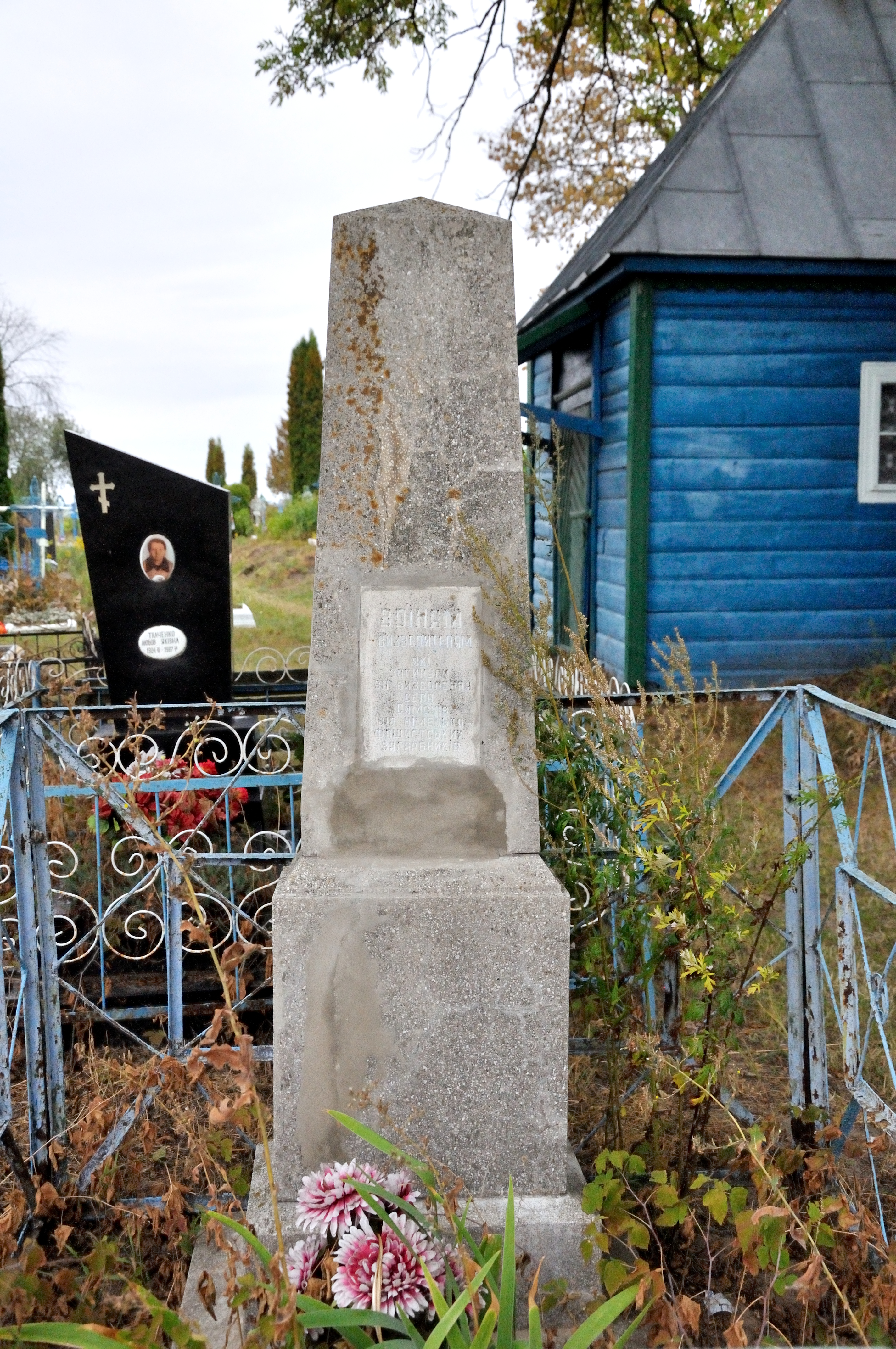 Пам’ятник воїнам-визволителям, с. Симонів